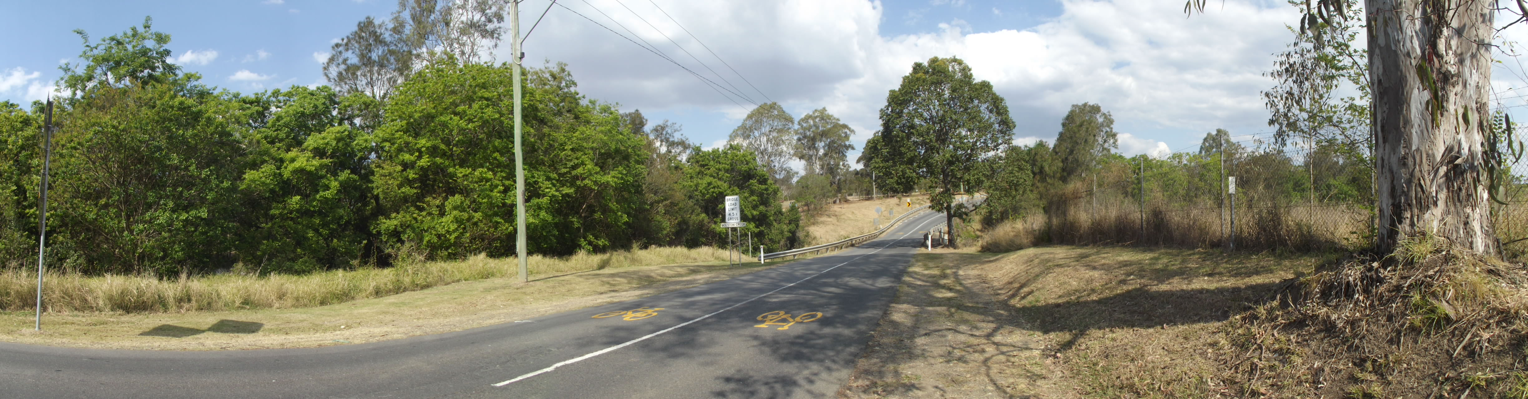 Wolston Creek bridge